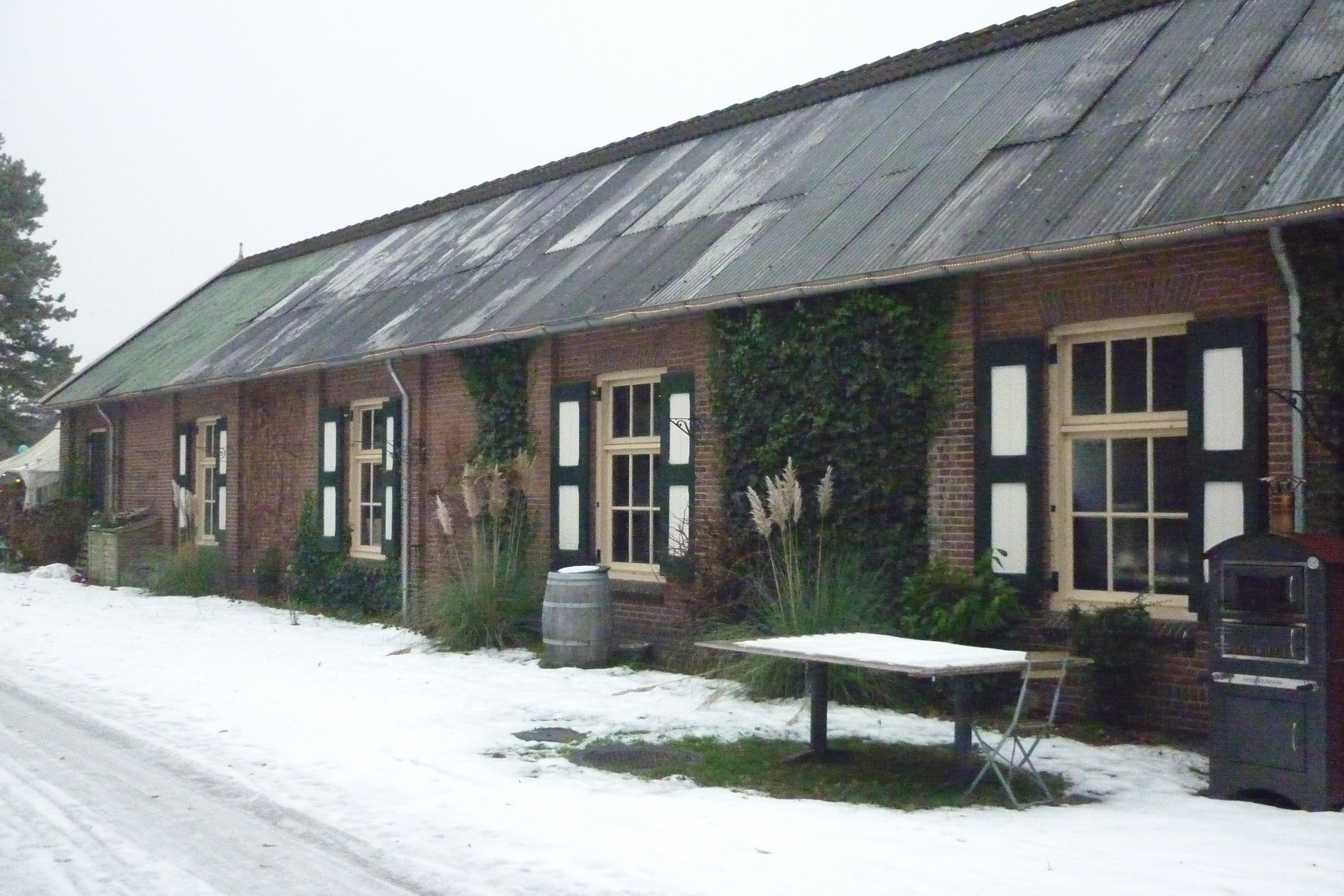 Artilleriegebouw van Fort Werk 4 in Bussum